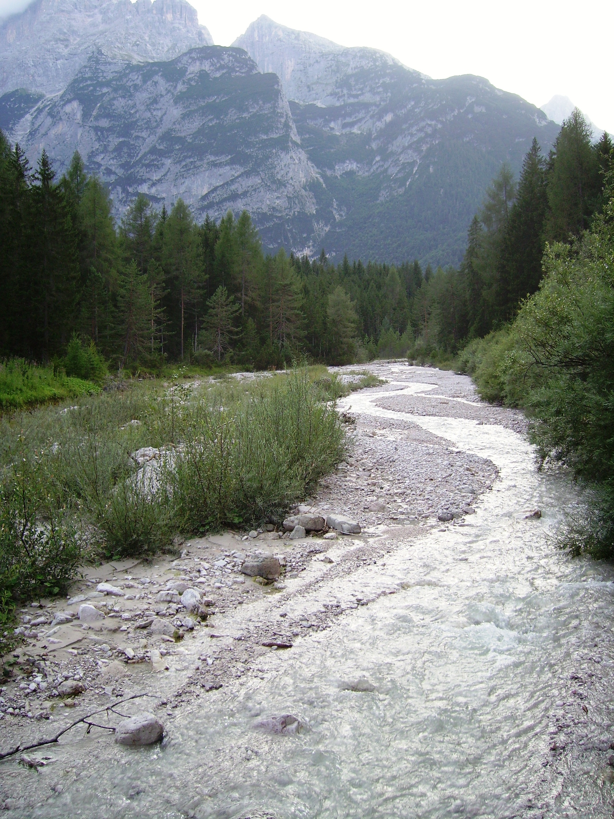 Vista dell'Ansiei dal Ponte degli Alberi, al margine della Riserva Naturale di Somadida (Comune di Auronzo di Cadore, Belluno).